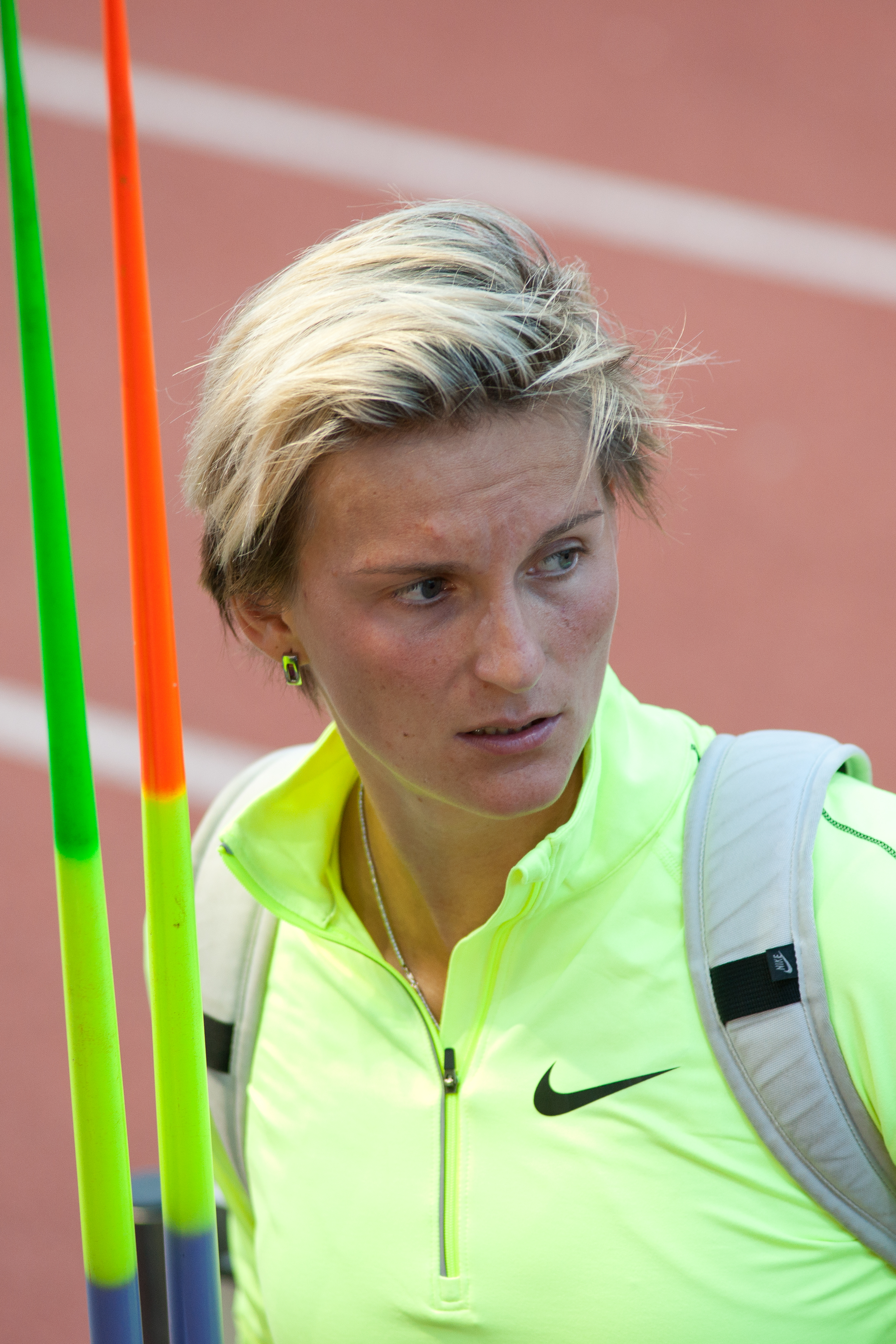 Athletissima 2012 - Barbora Špotáková